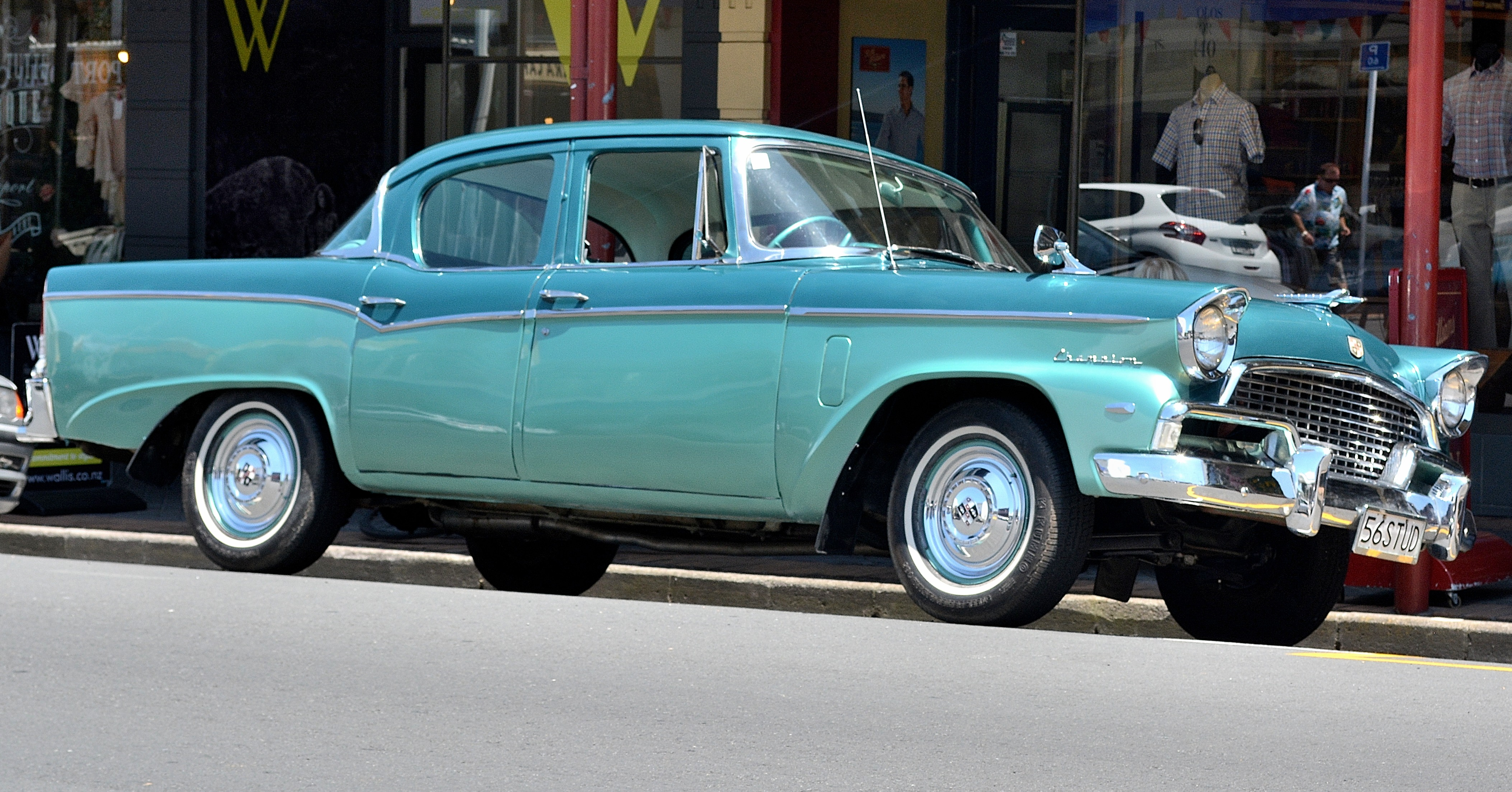 Devonport,Auckland.New Zealand